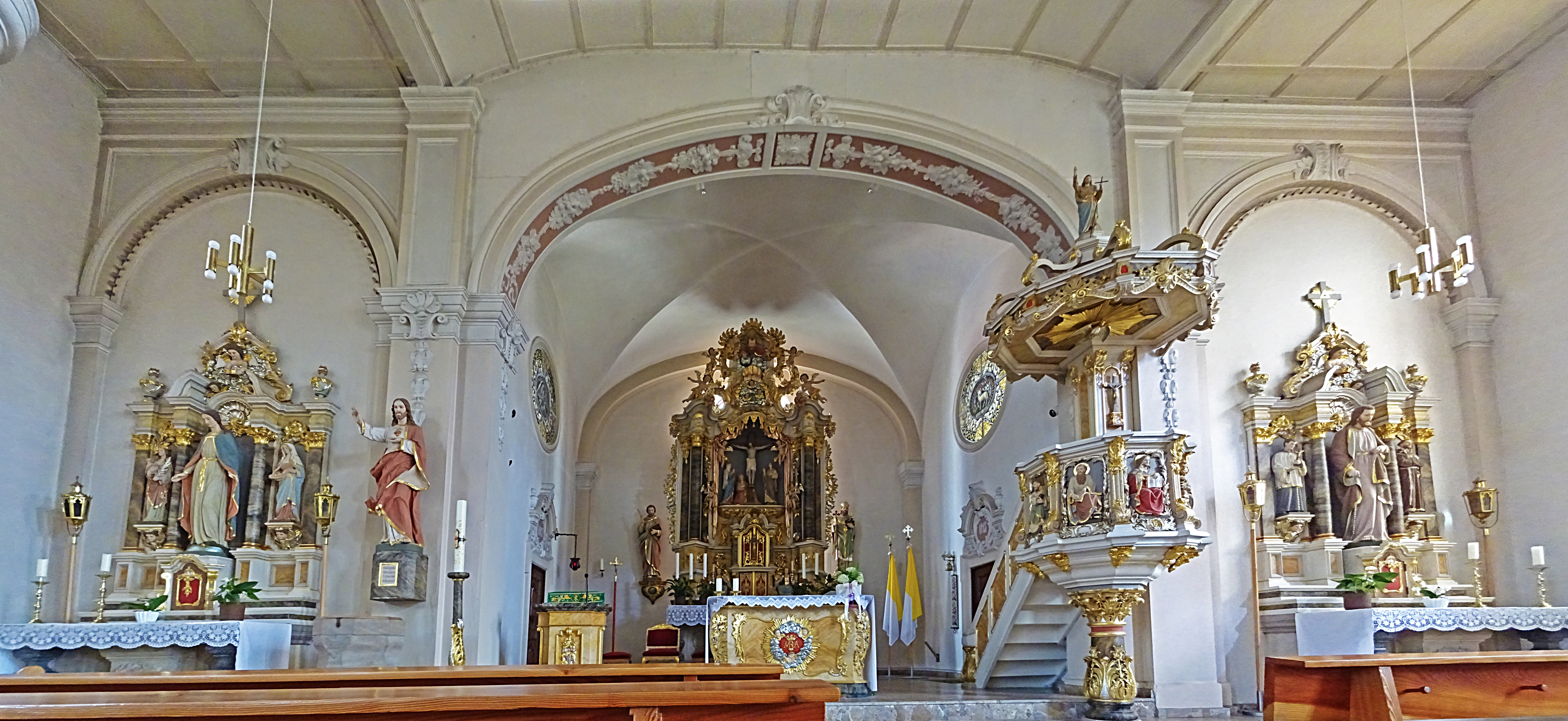 Altarbereich der Dorfkirche St. Bartholomäus (Hohengandern)